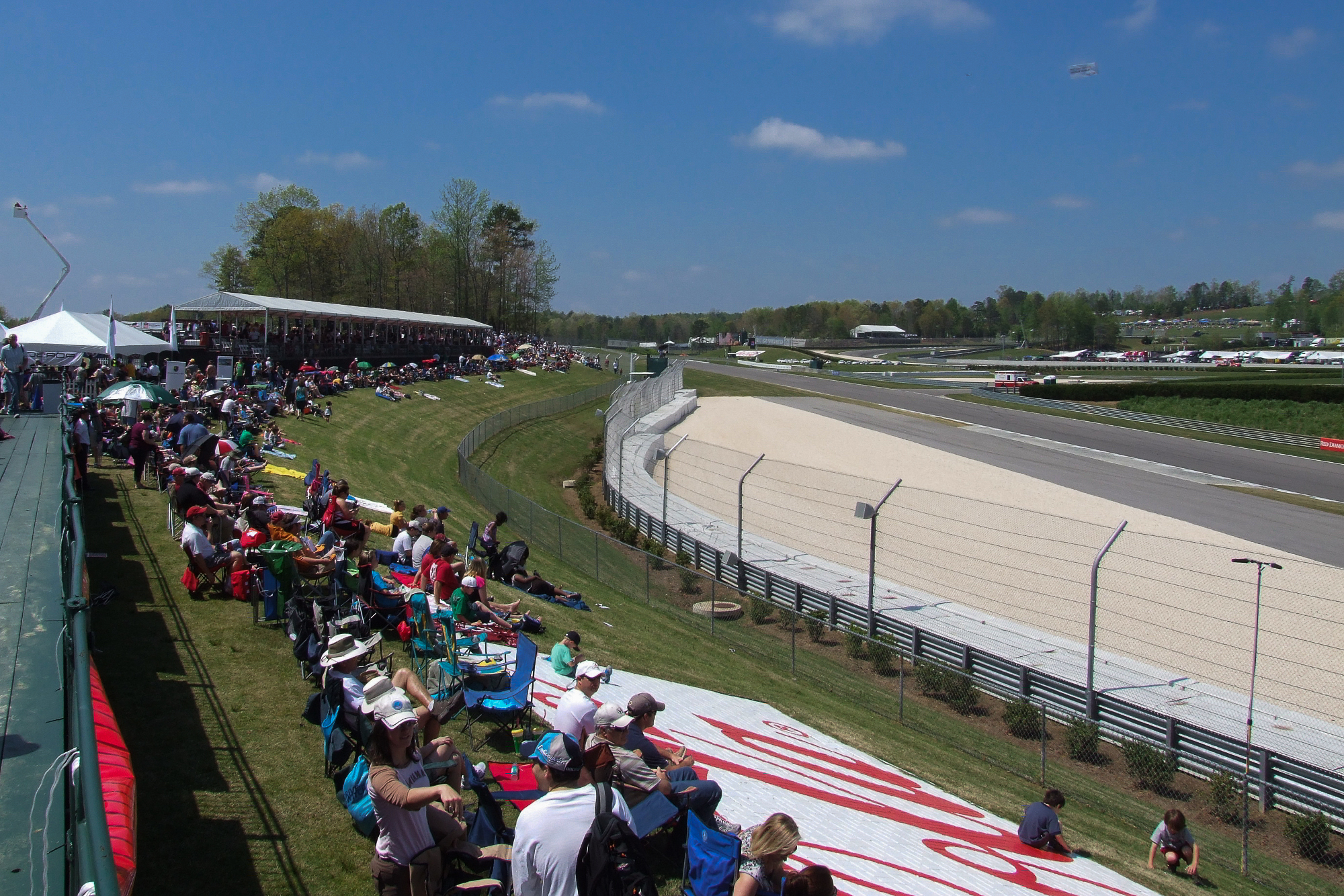 Tribuenen und Gegengerade im Barber Motorsports Park, Birmingham Alabama USA